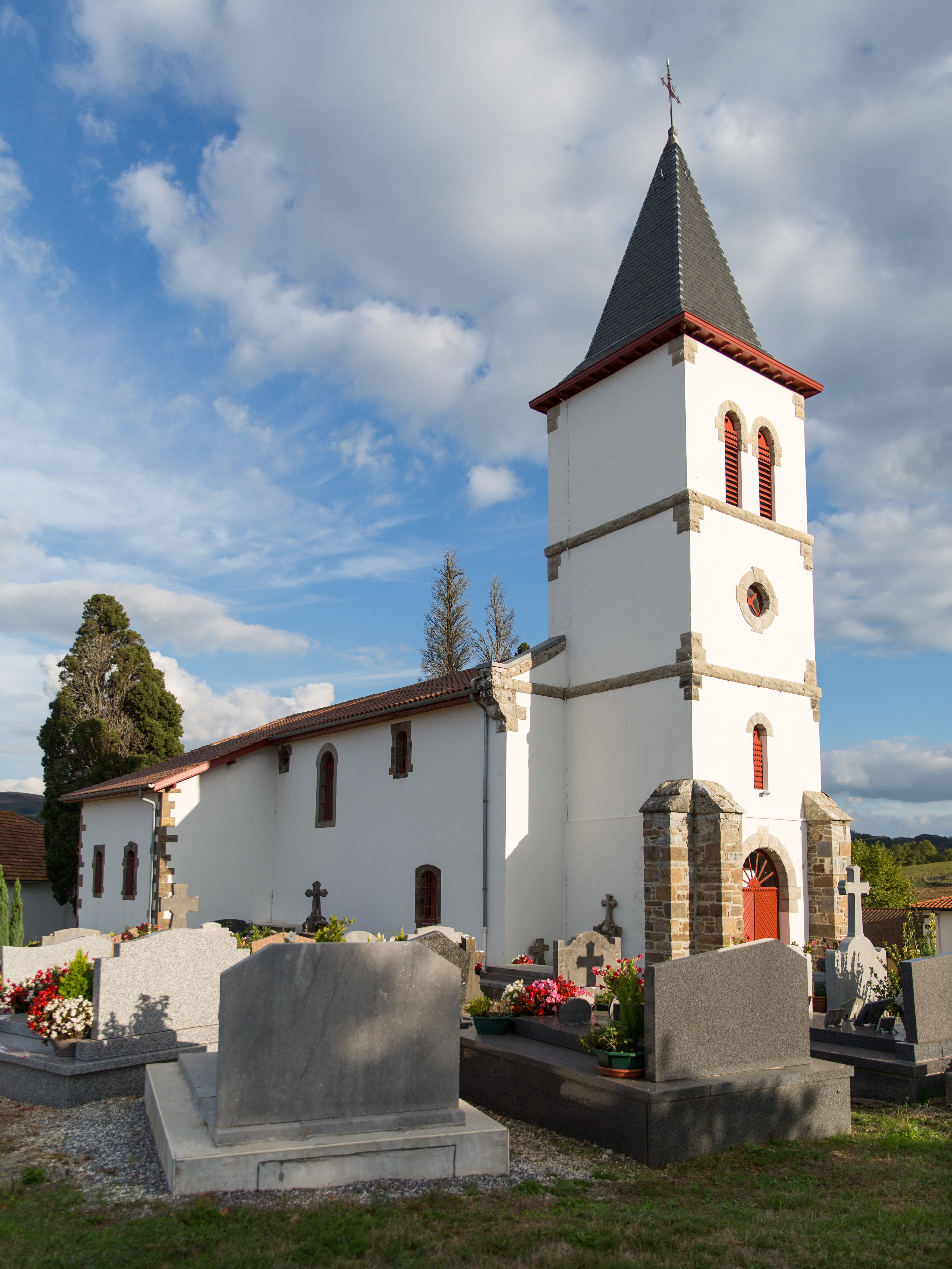 Église